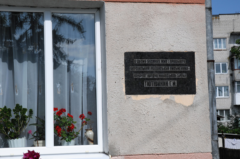 Будинок. де жив Григір Тютюнник в Кам'янці-Бузькій